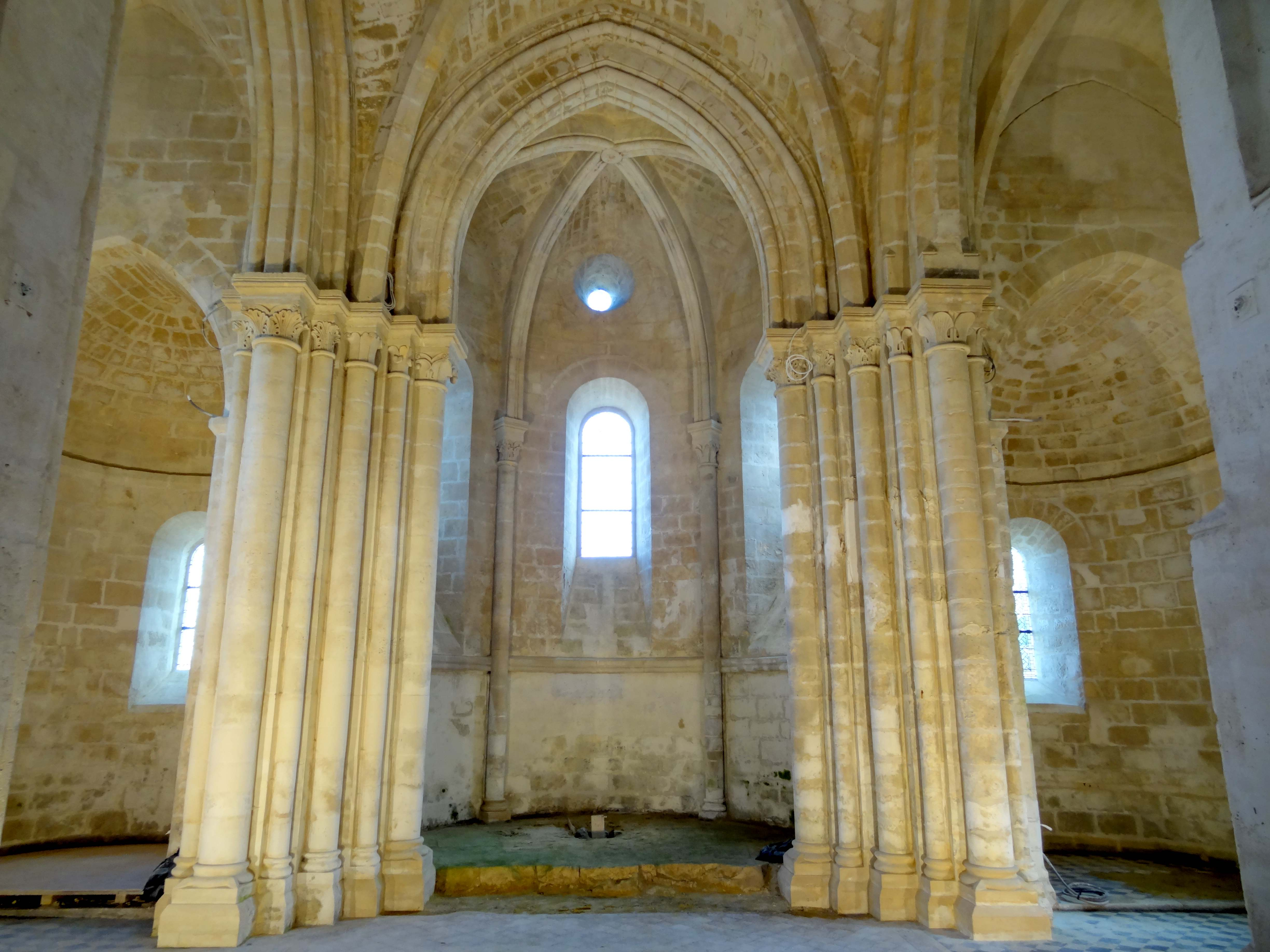 Intérieur de l'église - voir titre.